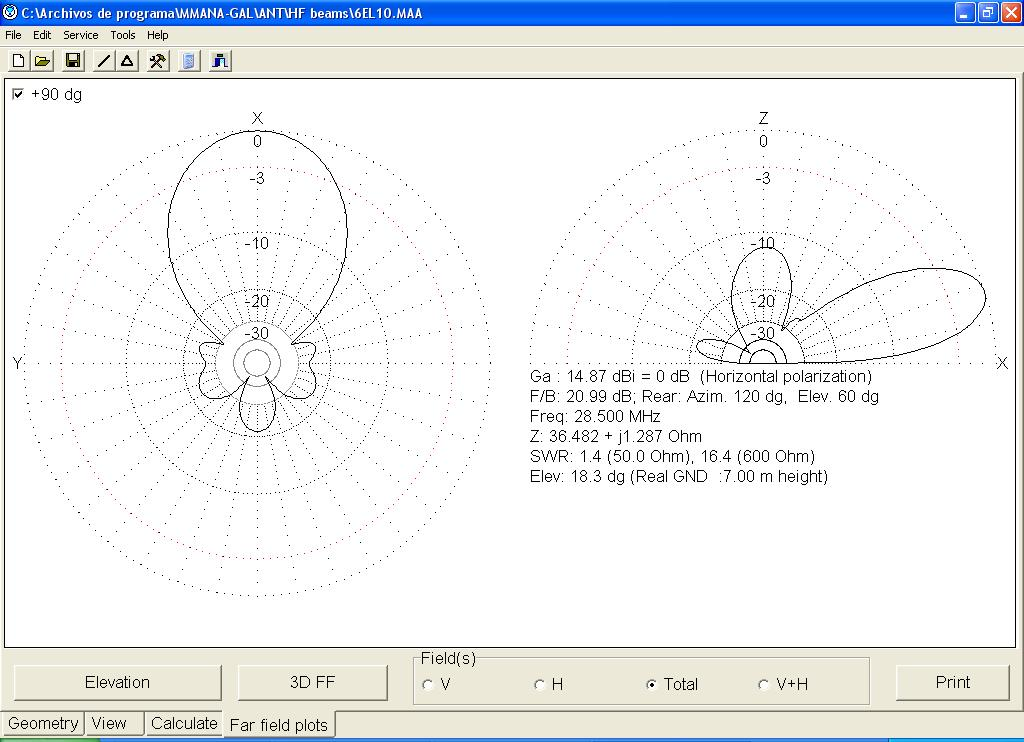 Diagrama X-Y de campo lejano de una antena yagi para la banda de radioaficionados de 10m, modelizada por MMANA MMANA-GAL Yagi 10m-Diagrama de irradiación campo lejano - Dimitri Agüero, F4DYT MMANA-GAL Yagi 10m-Far field diagram - Dimitri Agüero, F4DYT MMANA-GAL Yagi 10m-Champ lointain- Dimitri Agüero, F4DYT